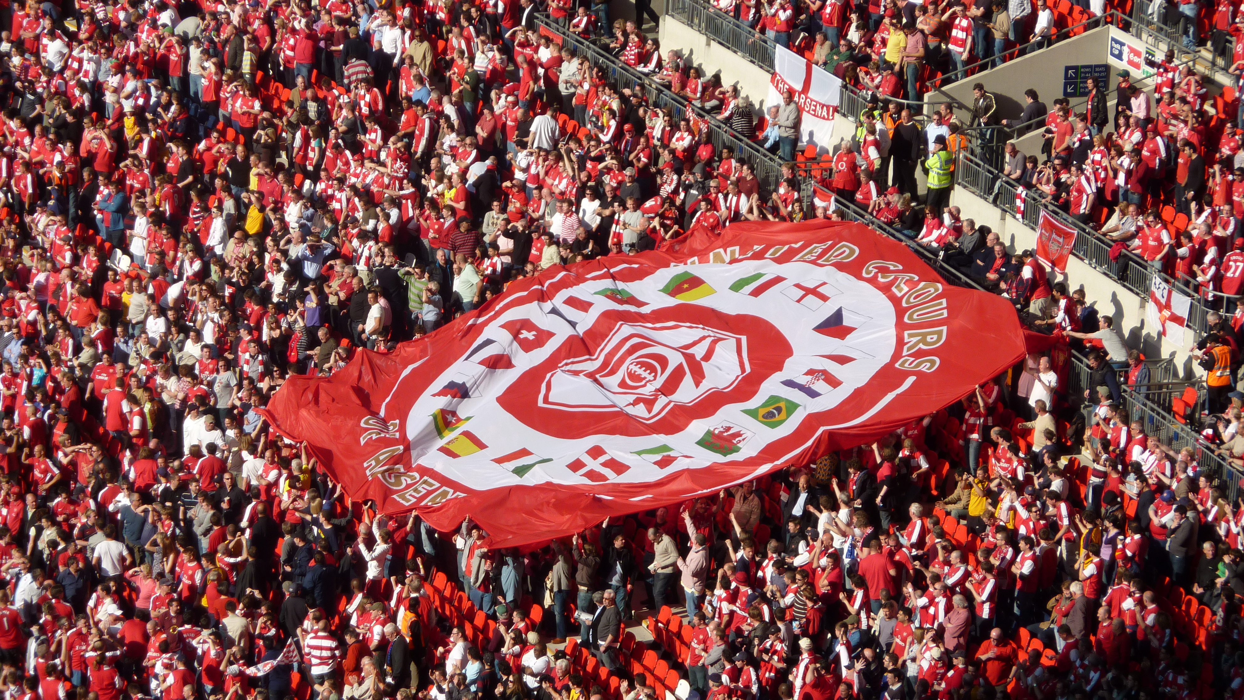 Arsenal Flag